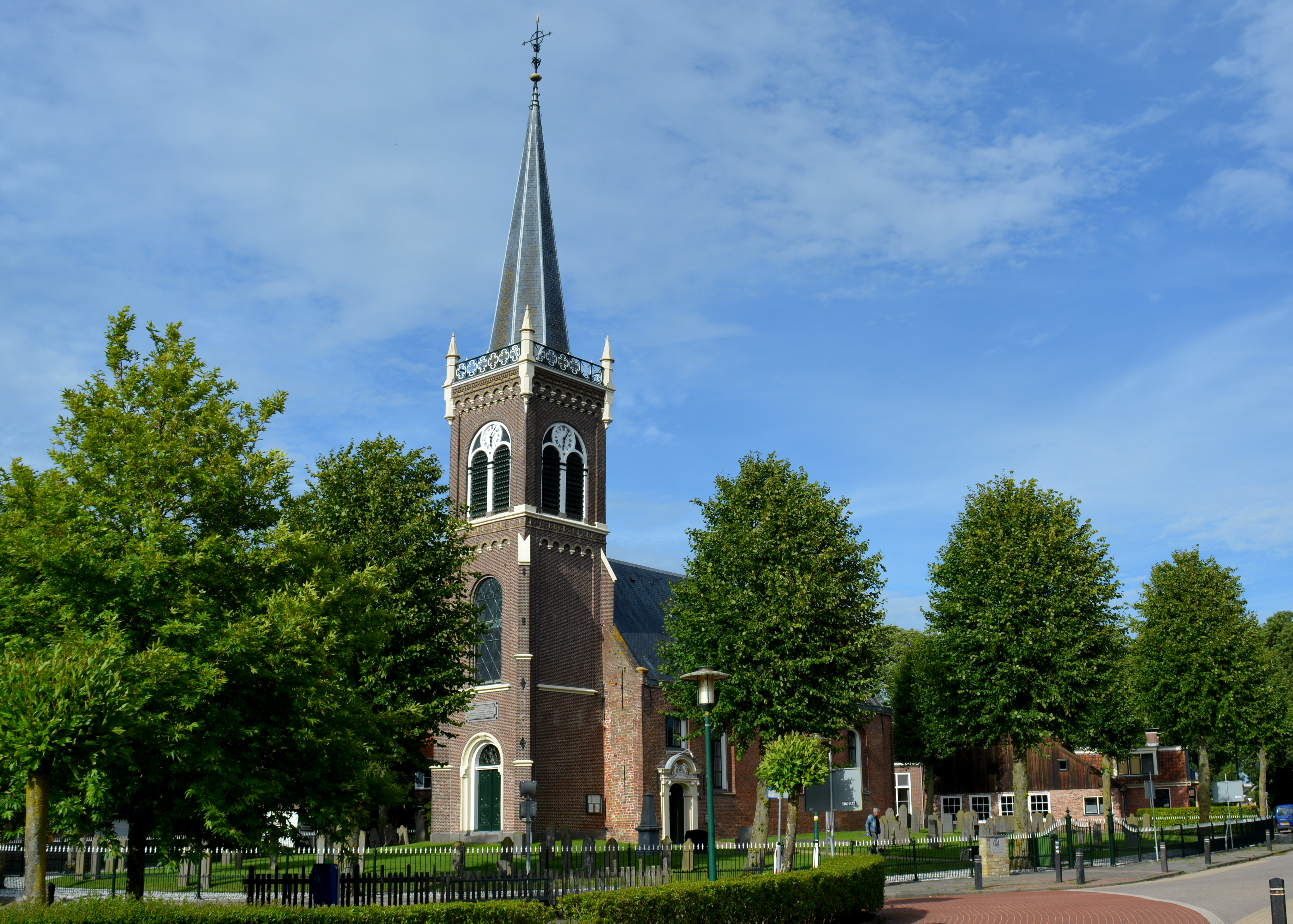 Reduzum, Vincentiustsjerke